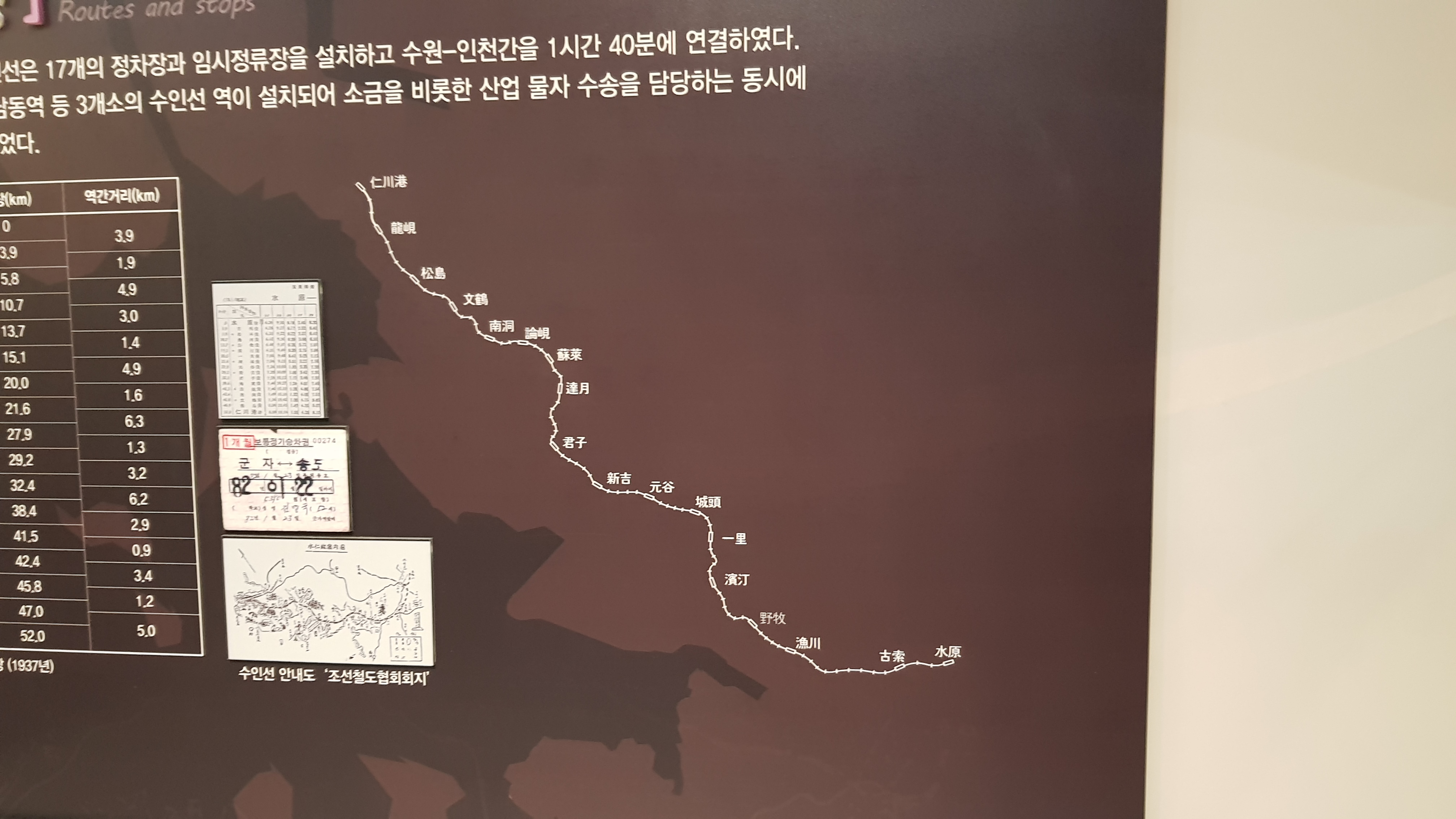 수인선 협궤철도